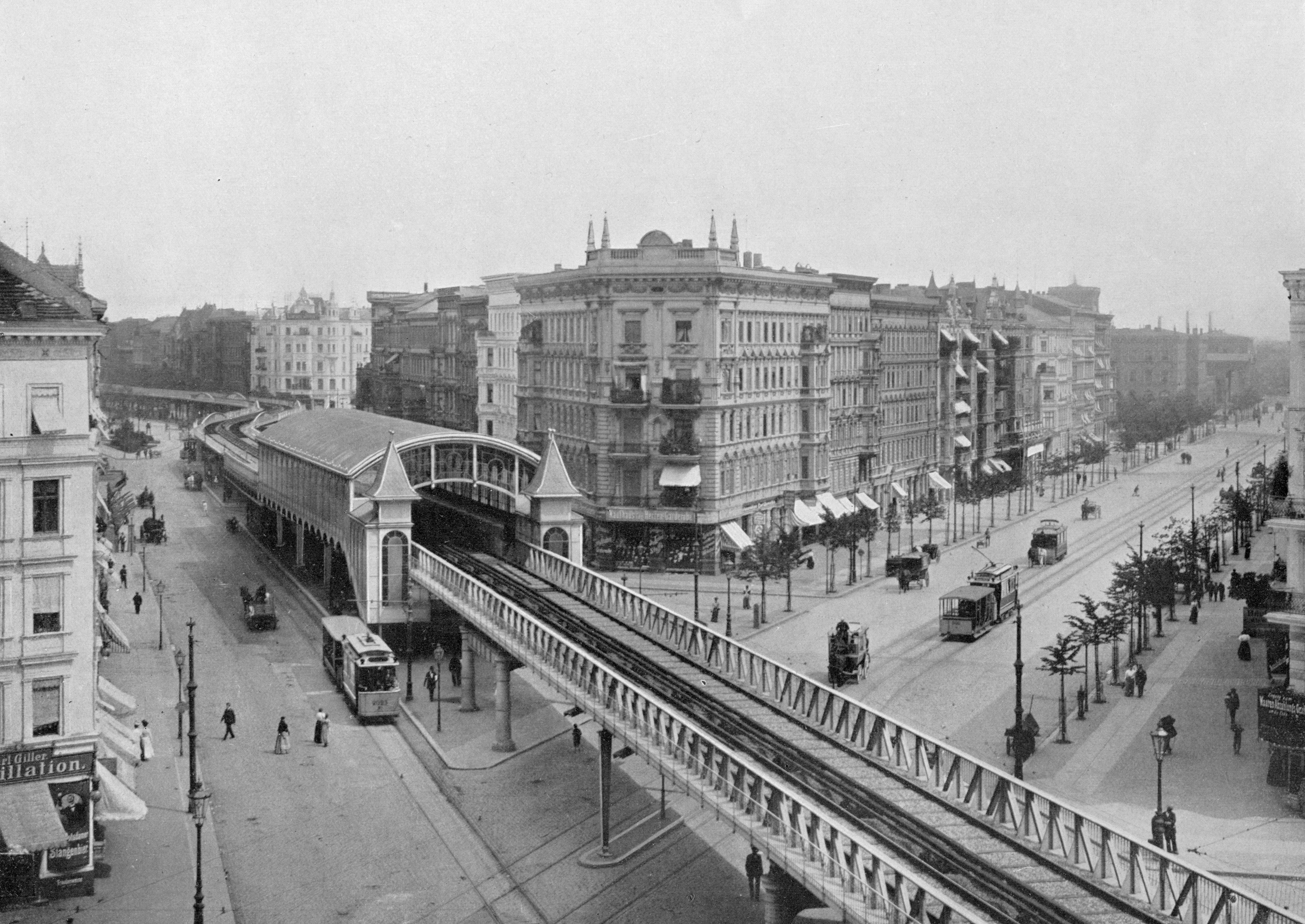 U-Bahnhof Görlitzer Bahnhof und Hochbahn über der Kreuzung Skalitzer Straße, Oranienstraße, Manteuffelstraße, Wiener Straße in Berlin-Kreuzberg